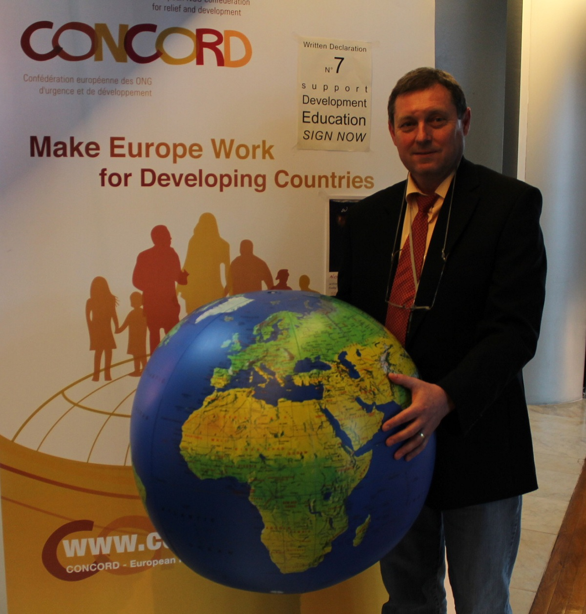 MEP Jiří MAŠTÁLKA, Czech Republic